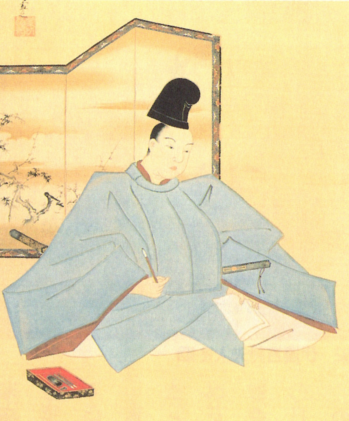 伊達吉村の自画像。